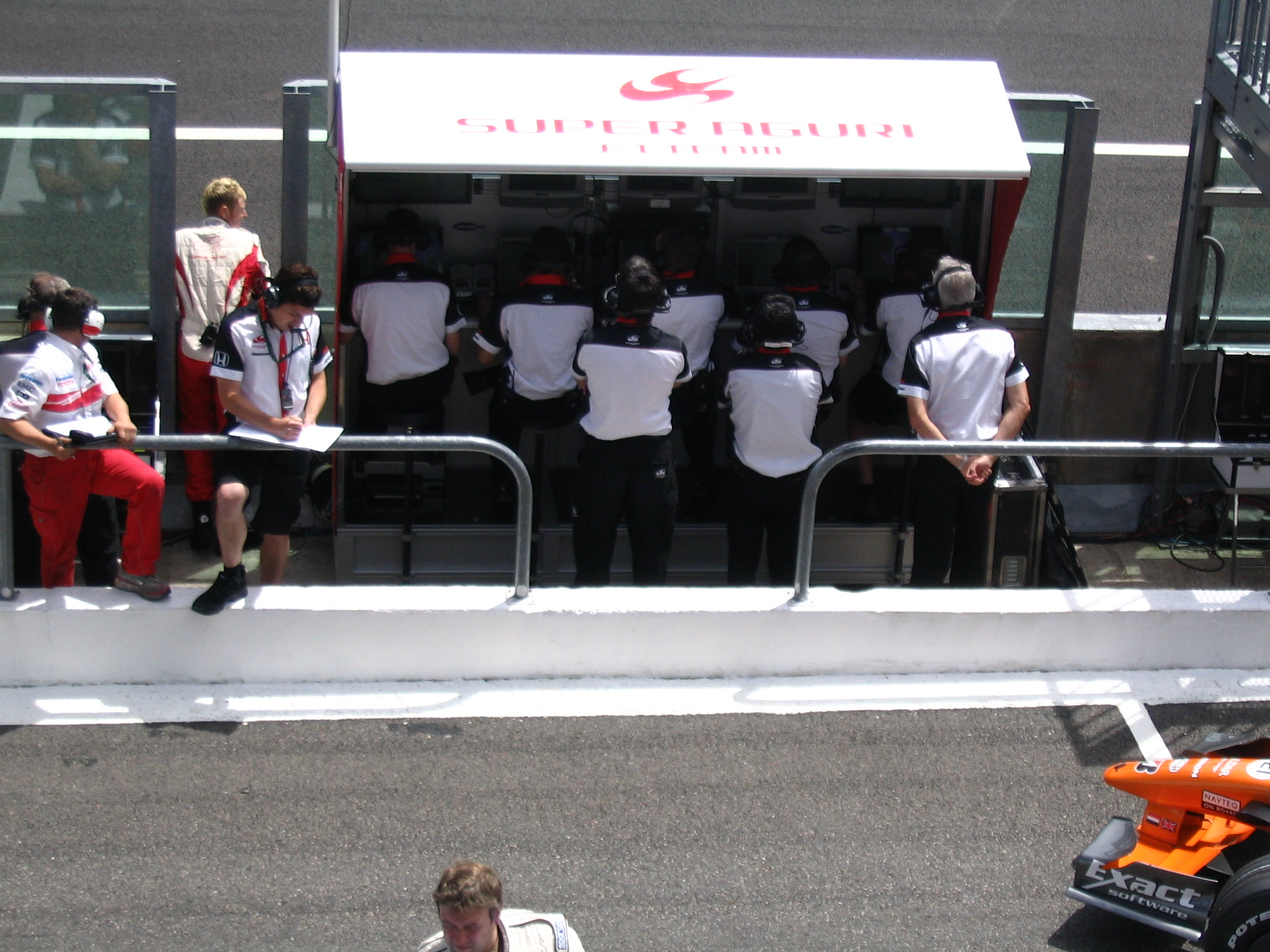 Circuit de Magny Court, Grand Prix de France